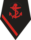 distinguido